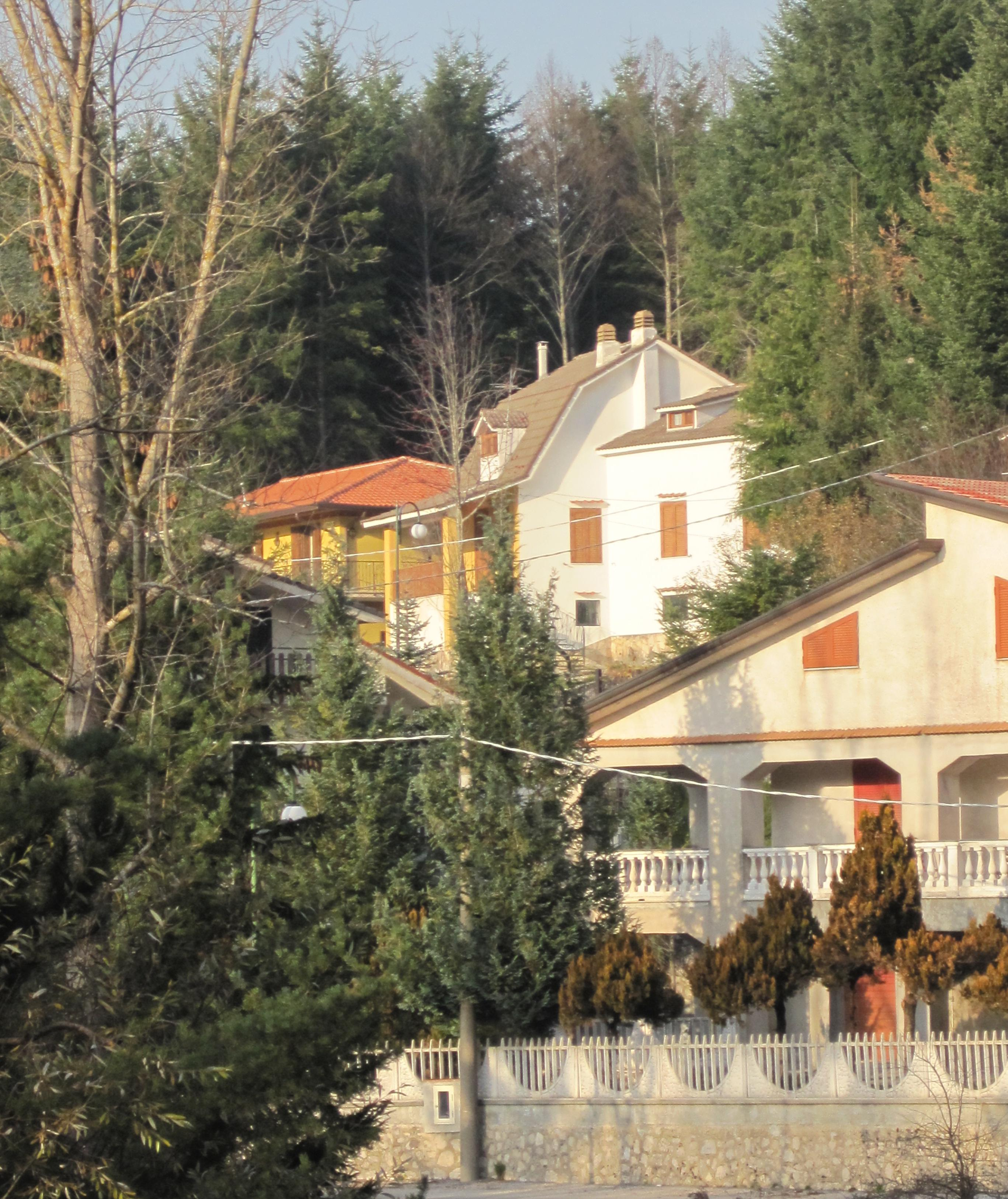 Foto scattata oggi 20/11/09 da me a Laceno.